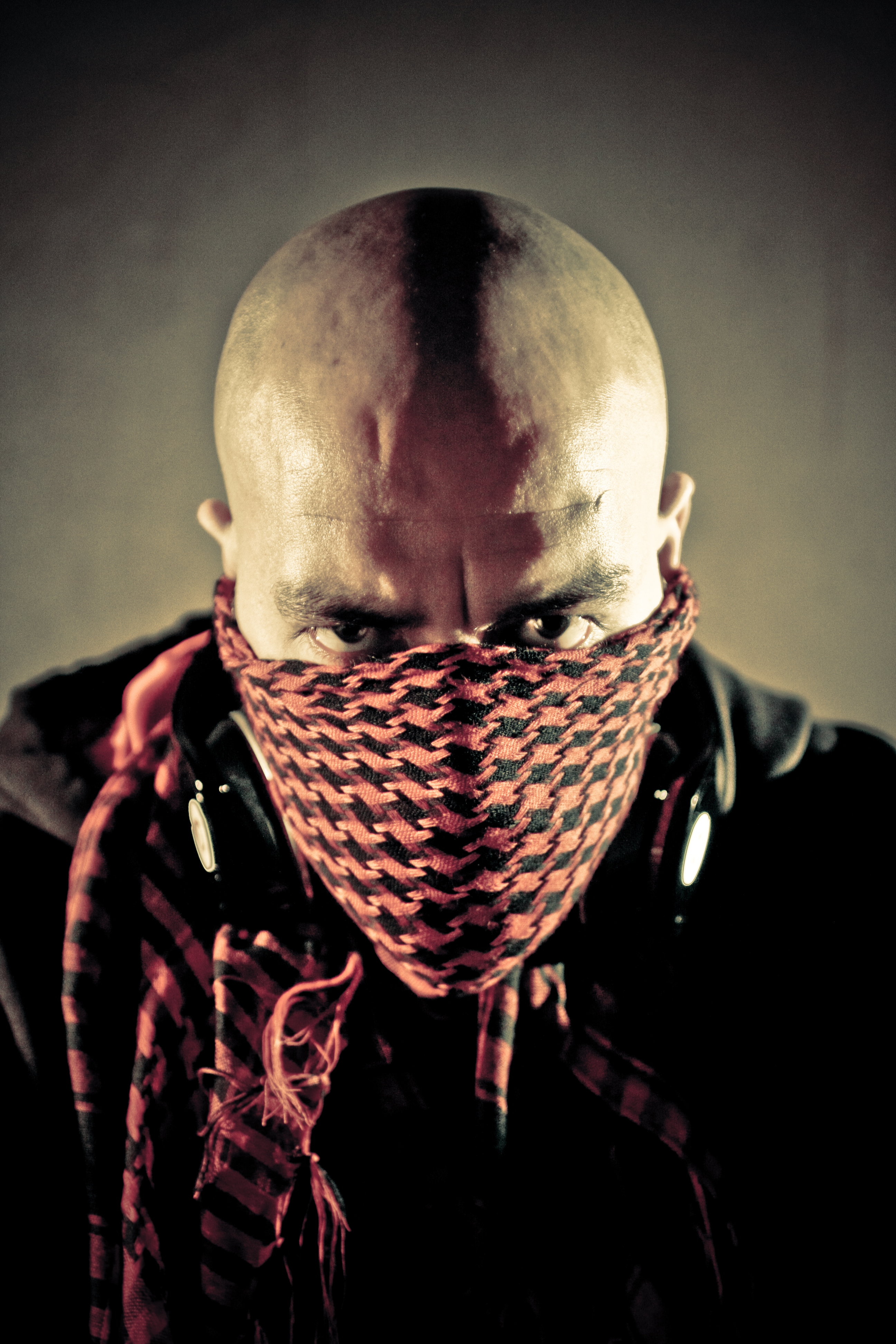 Abid Tounssi (Alphen aan den Rijn, 23 juni 1980), beter bekend als Salah Edin, is een Nederlands-Marokkaanse rapper. Hij maakt naast Nederlandstalig vooral Arabische rap, waarmee hij redelijke bekendheid geniet binnen het internationale rapcircuit. Salah Edin werkte tijdens zijn carrière onder meer samen met Hind, Outlandish, Sefyu, Propaganda en Cilvaringz. Ook verscheen hij onder meer op een mixtape van Aftermath Entertainment en trad op in meer dan 37 landen.